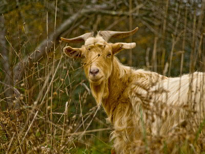 Bode, Galicia (Spain)